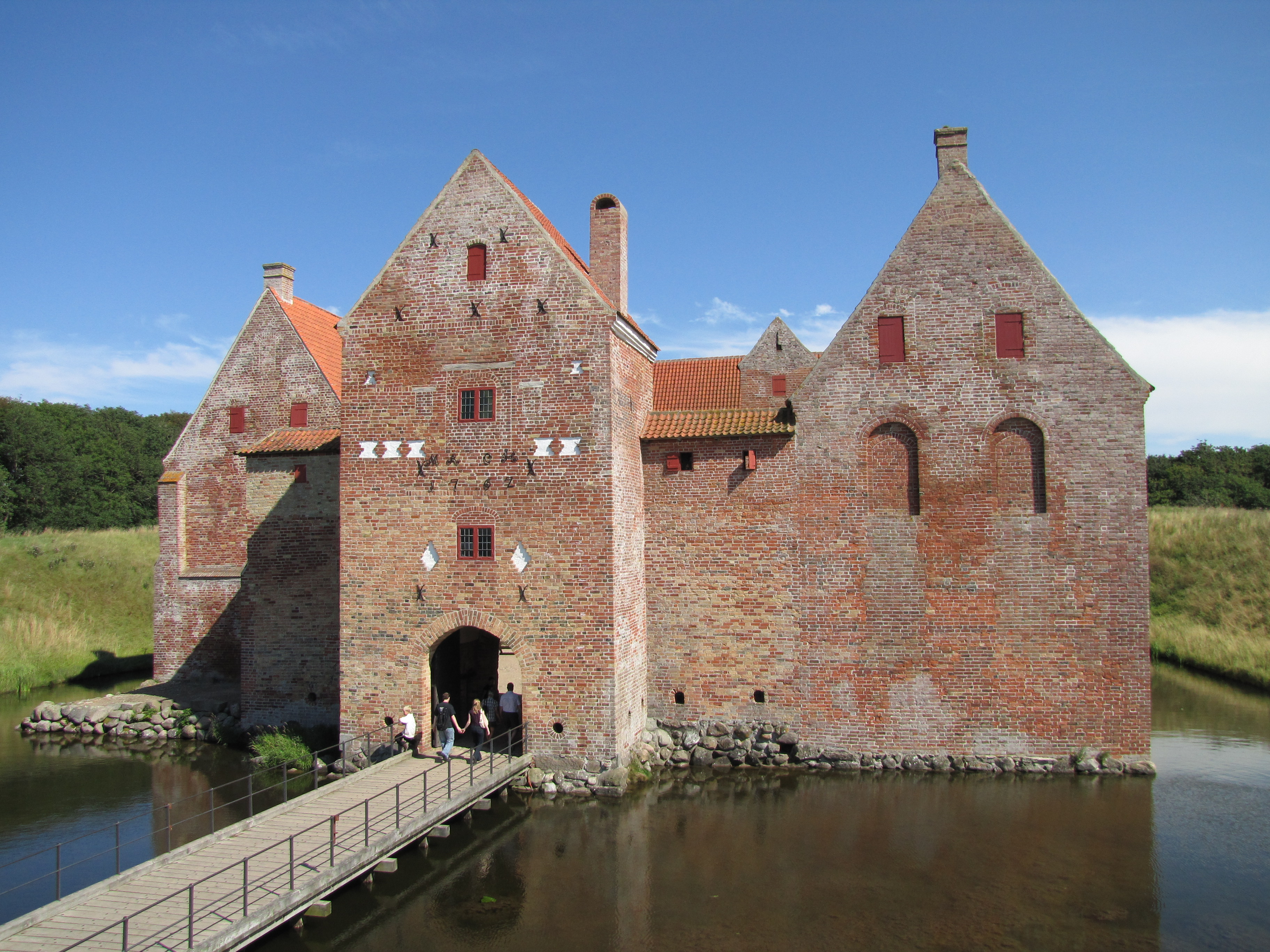 Spøttrup